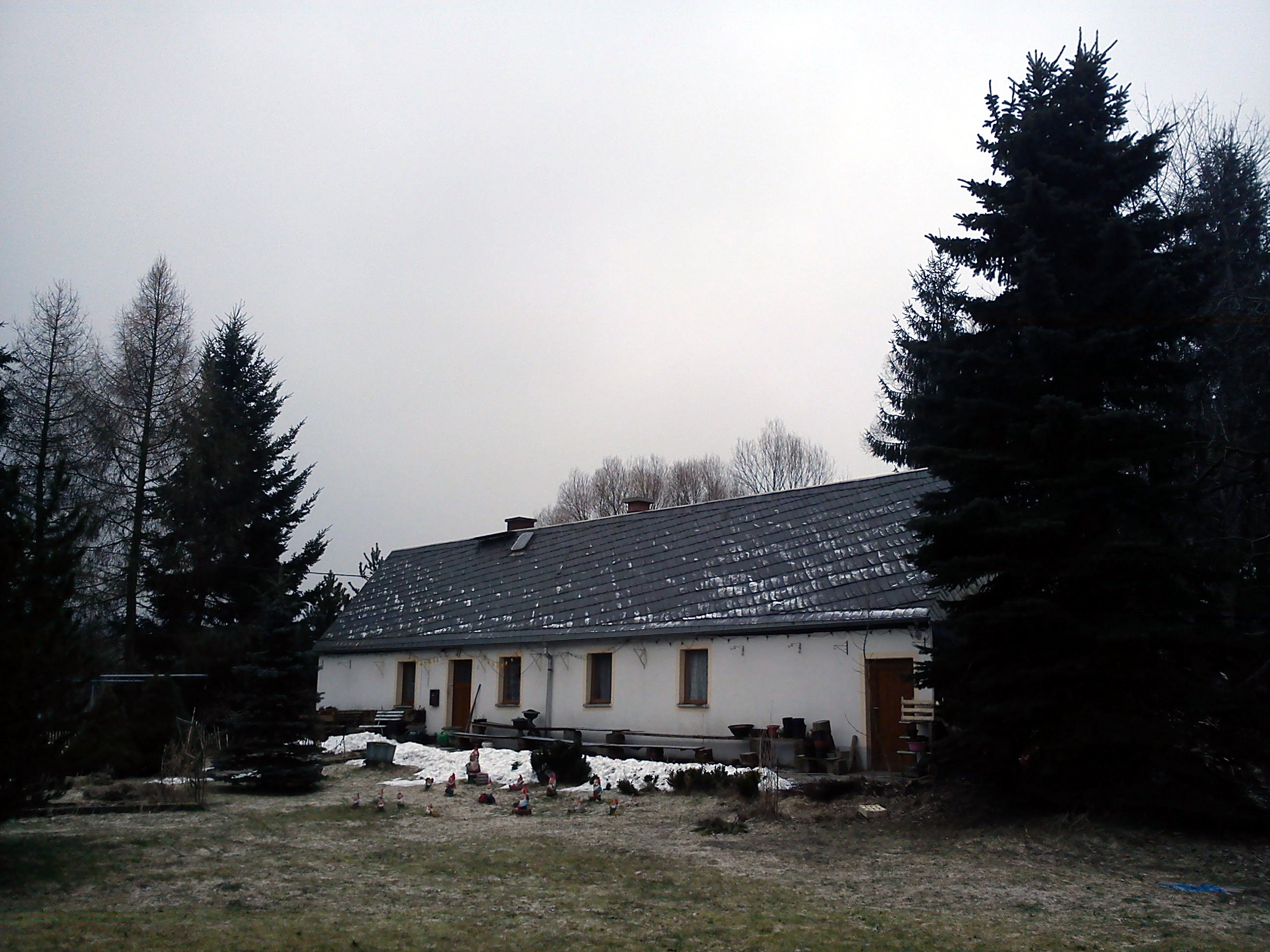 Floßwärterhaus von 1758 in der Flöha-Aue bei Görsdorf - heute: Fischereiweg 39, 09509 Pockau - hier wohnte der Floßwärter der Görsdorf-Blumenauer-Flöße.